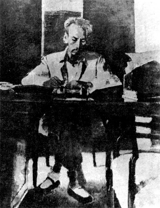 Ký-họa chì-than Tô-ngọc-Vân.